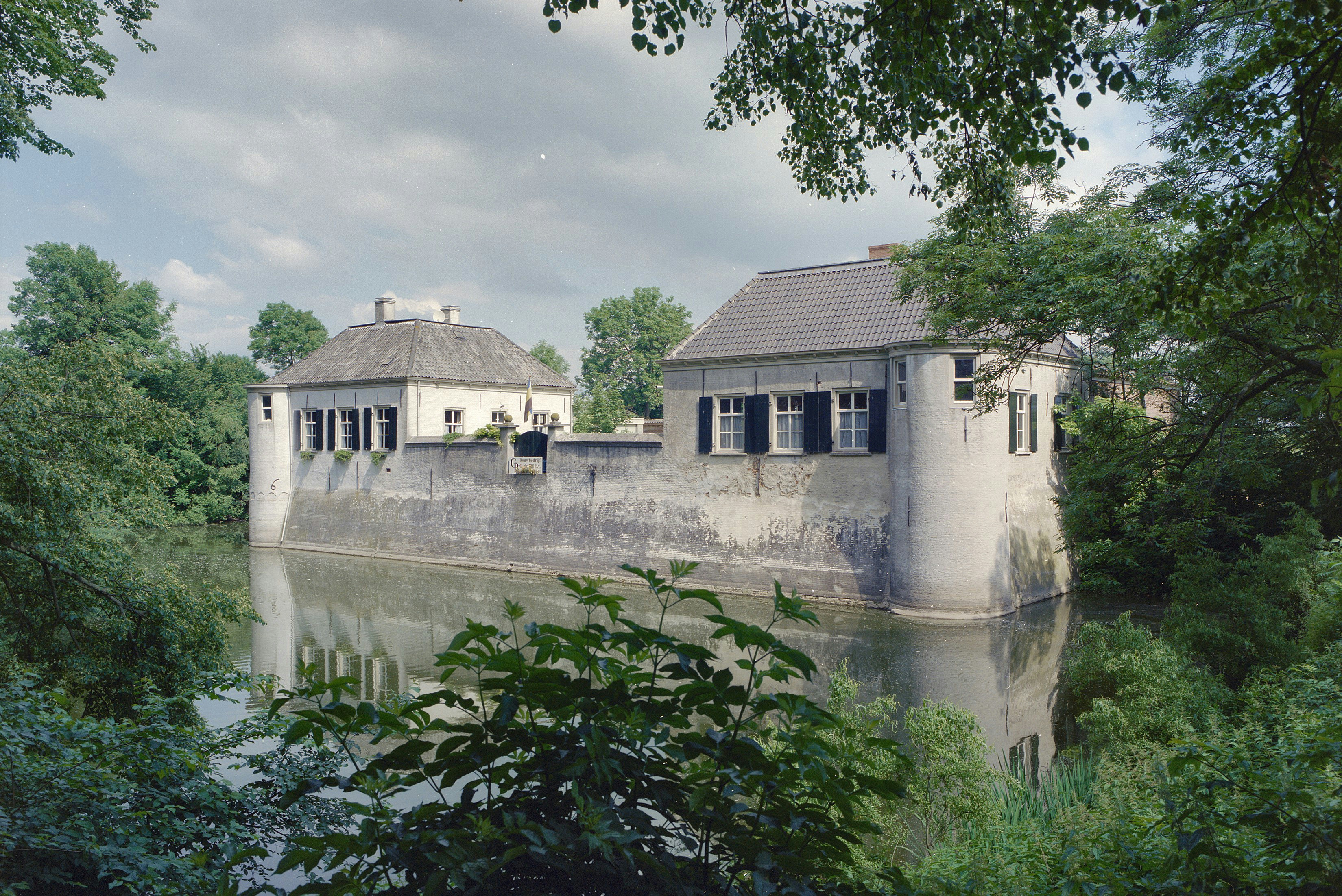 Kasteel Oijen: Exterieur OVERZICHT